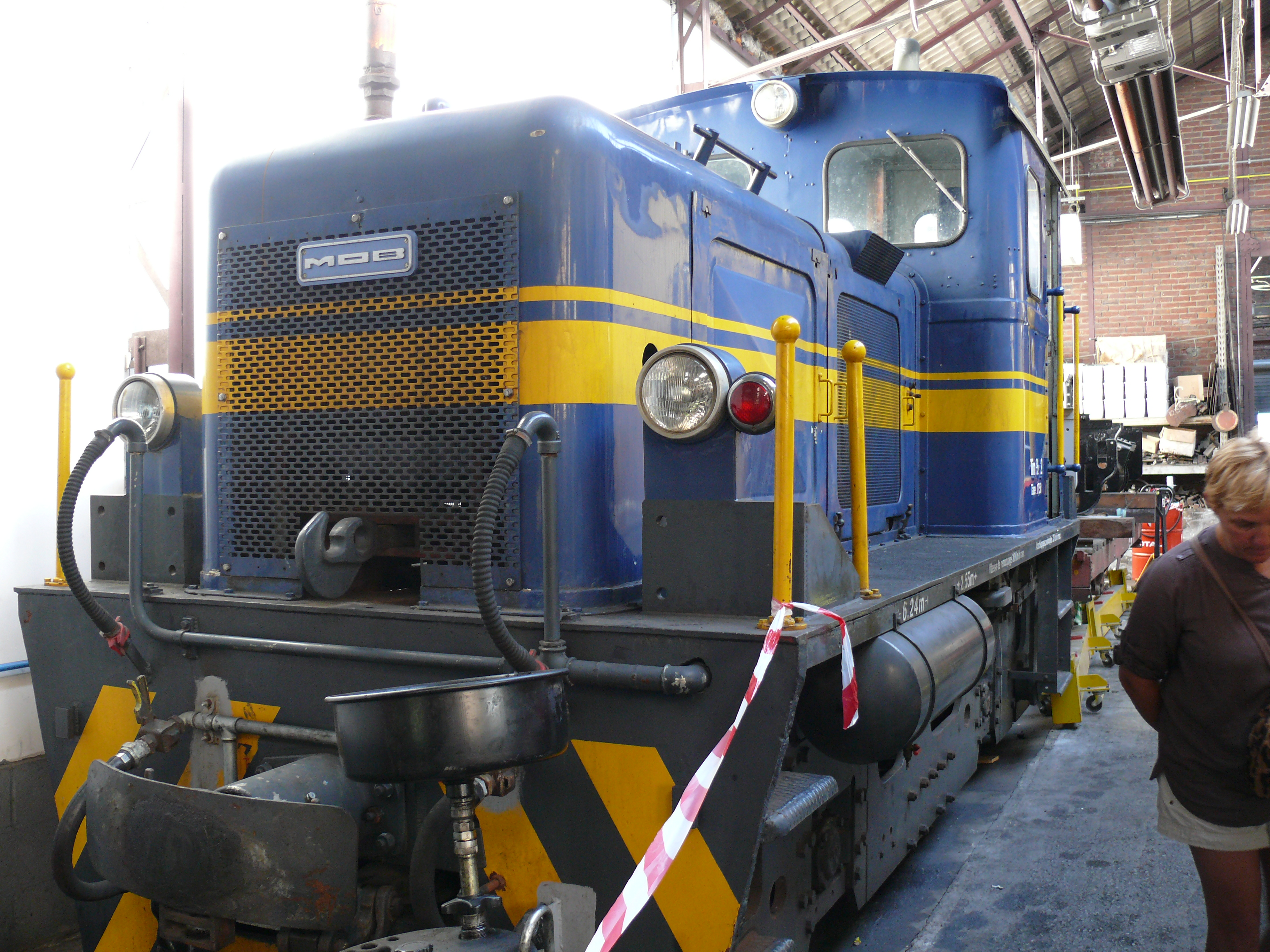 Locotracteur B-dh n°2 ex MOB au dépôt de Saint-Valery Canal